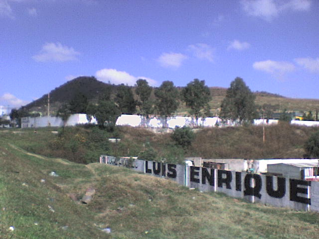 Imagen del Volcán La Caldera vista desde la Autopista México-Puebla. El volcán forma parte de la Sierra de Santa Catarina